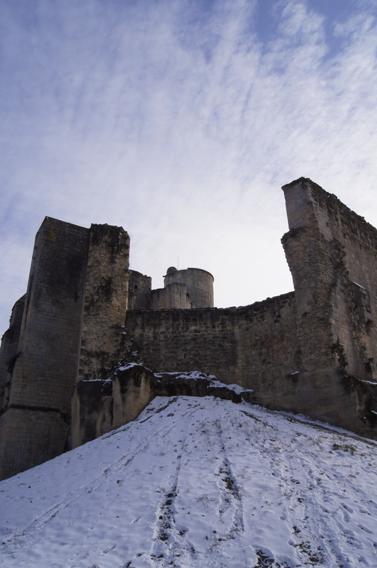 Château de Rauzan